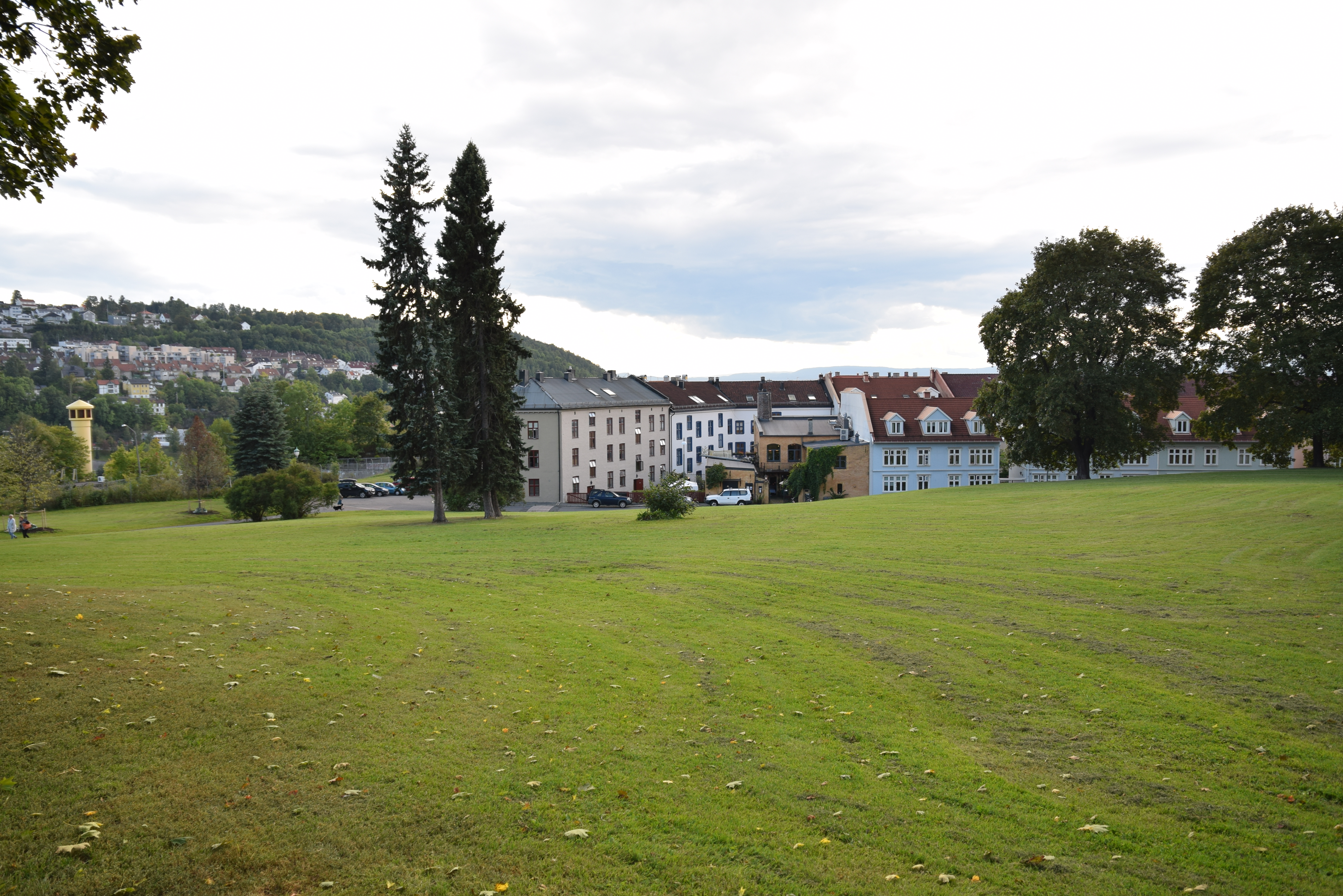 Vålerenga park sett mot Opplandgata